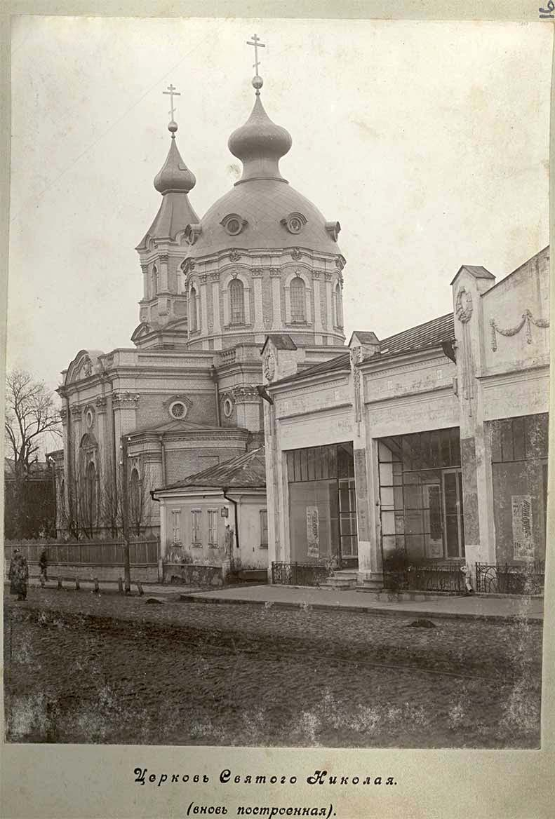 Церковь Святого Николая в Бердичеве (каменная)